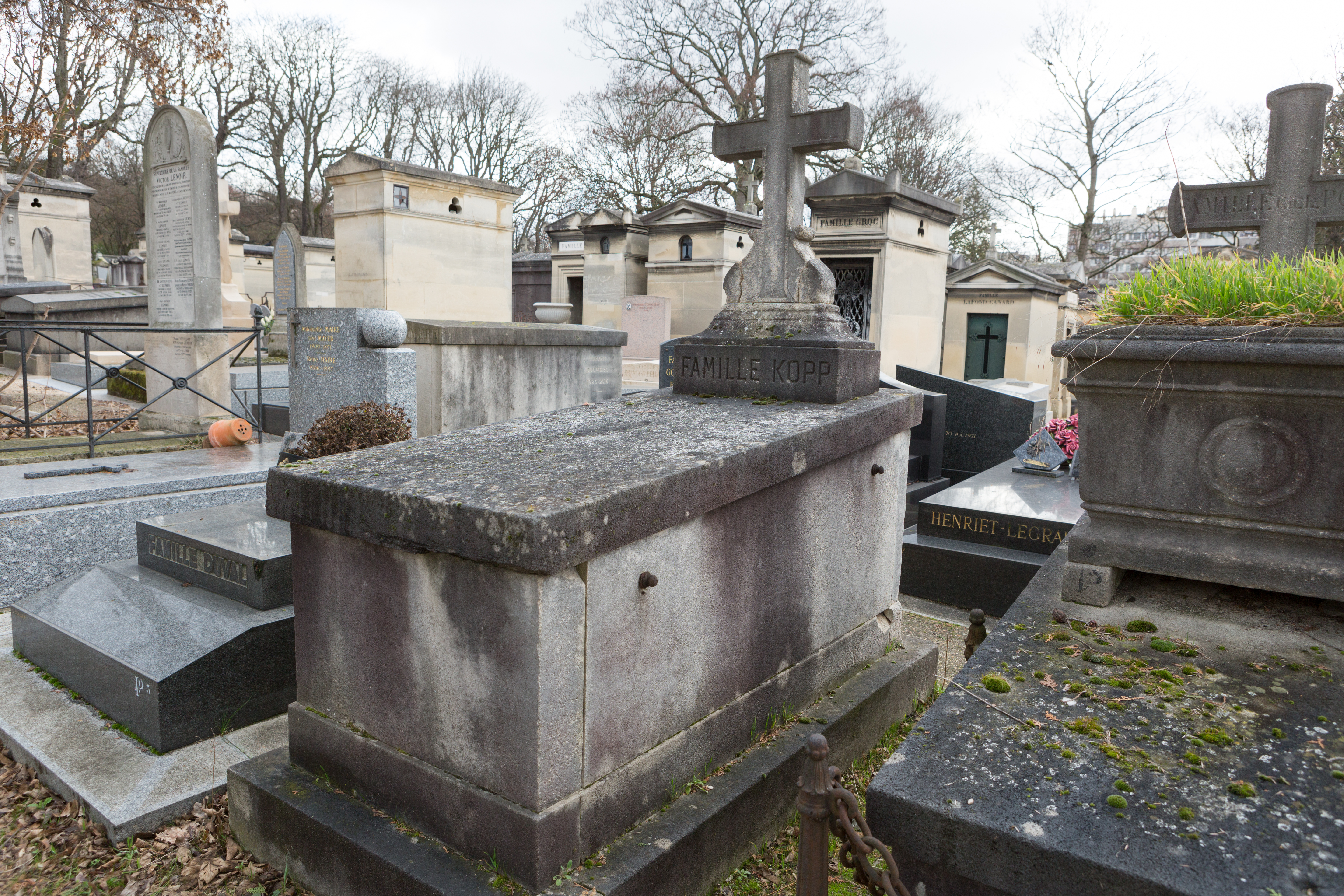 sépulture de Jean-Laurent Kopp (1812-1872), comédien et chanteur 1812 et mort le 23 septembre 1872.